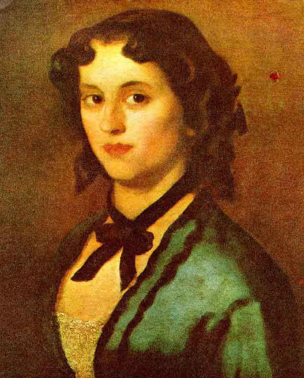 Ђура Јакшић – „Девојка у плавом“; уље на платну